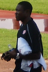 Paul Alo'o Efoulou, footballeur professionnel